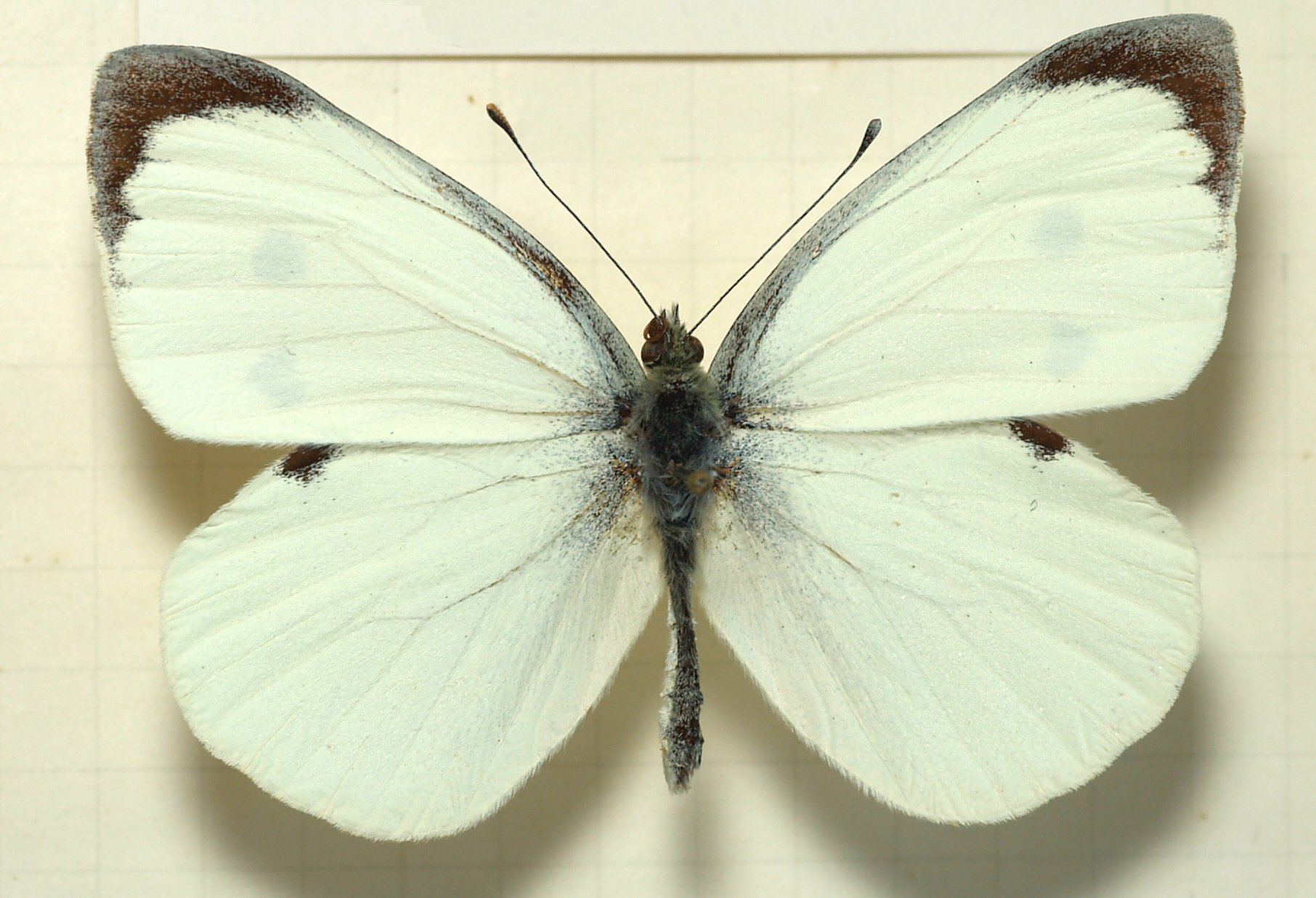 male Pieris brassicae